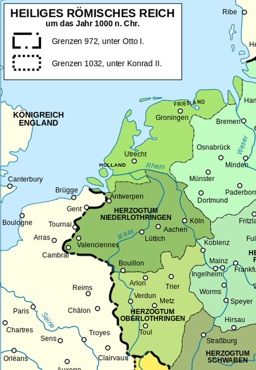 Die Herzogtümer Nieder- und Oberlothringen um 1000